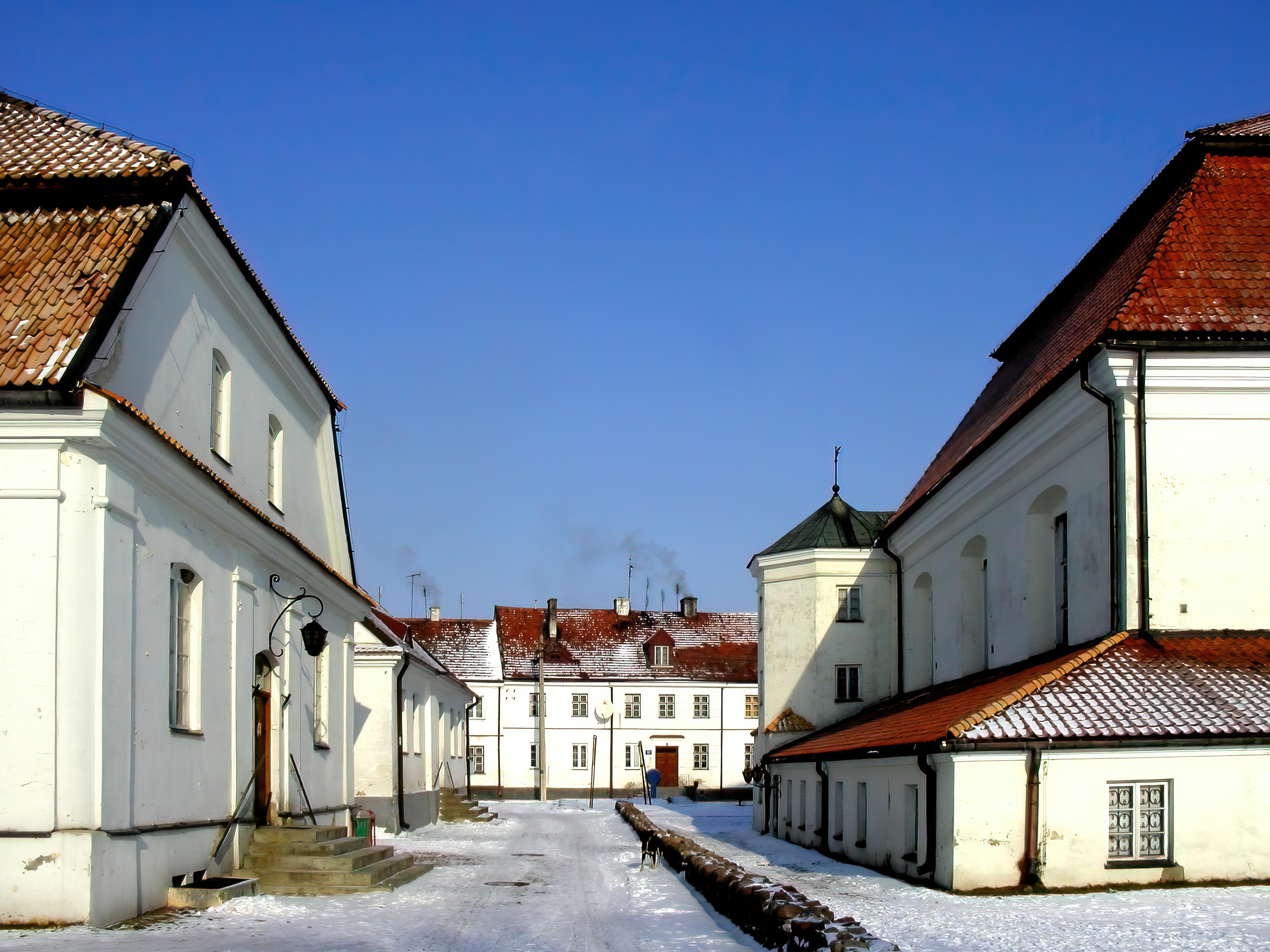 Mały Rynek w Tykocinie - ul. Piłsudskiego, Synagoga, Dom Talmudyczny